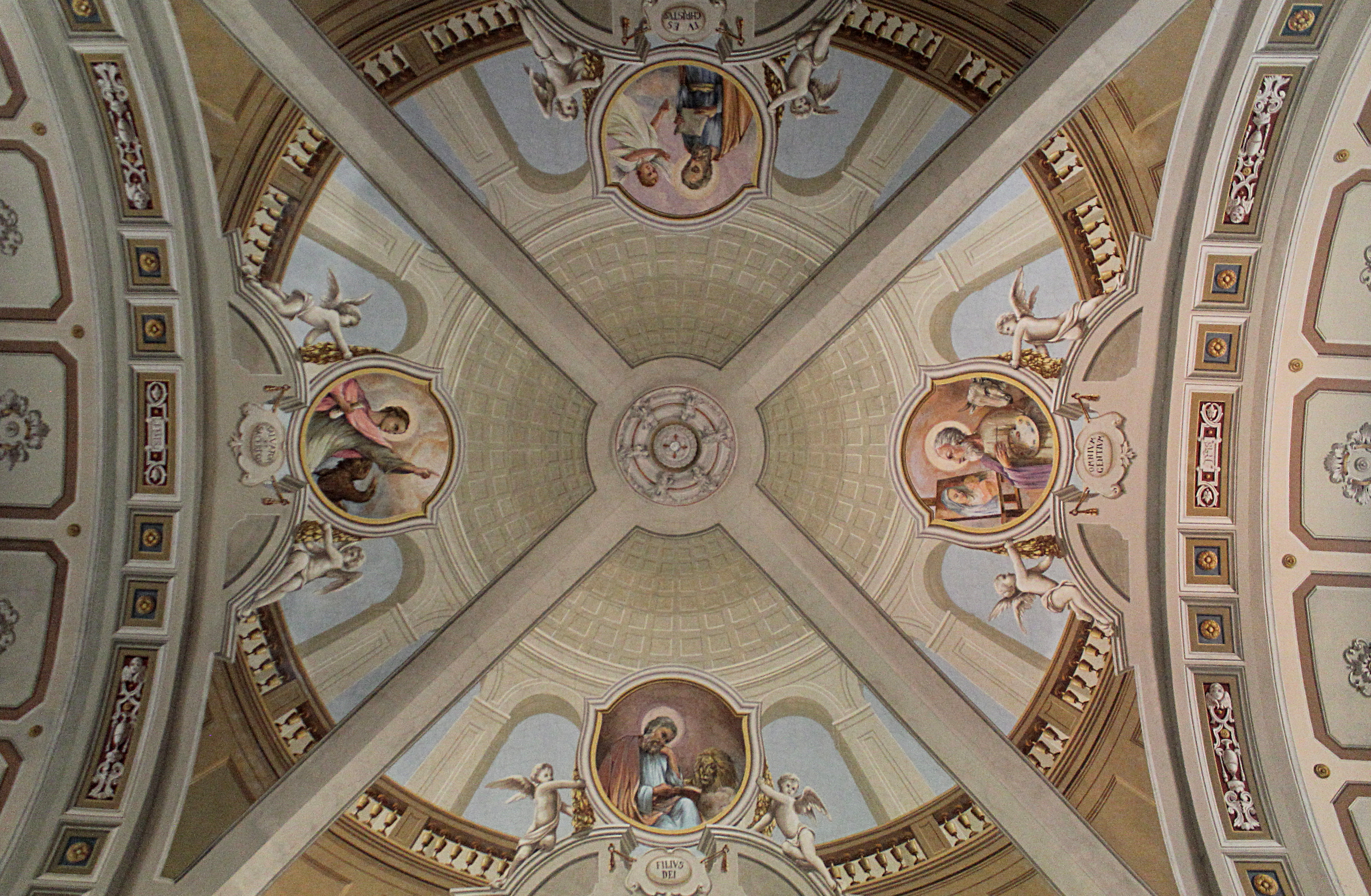 Affresco dei quattro evangelisti, chiesa di San Lazzaro